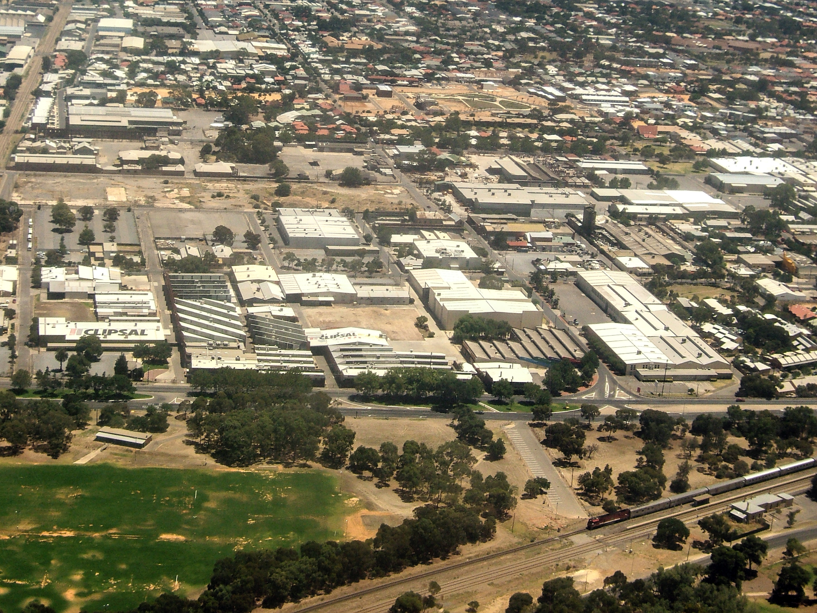 Bowden aerial view, Adelaide